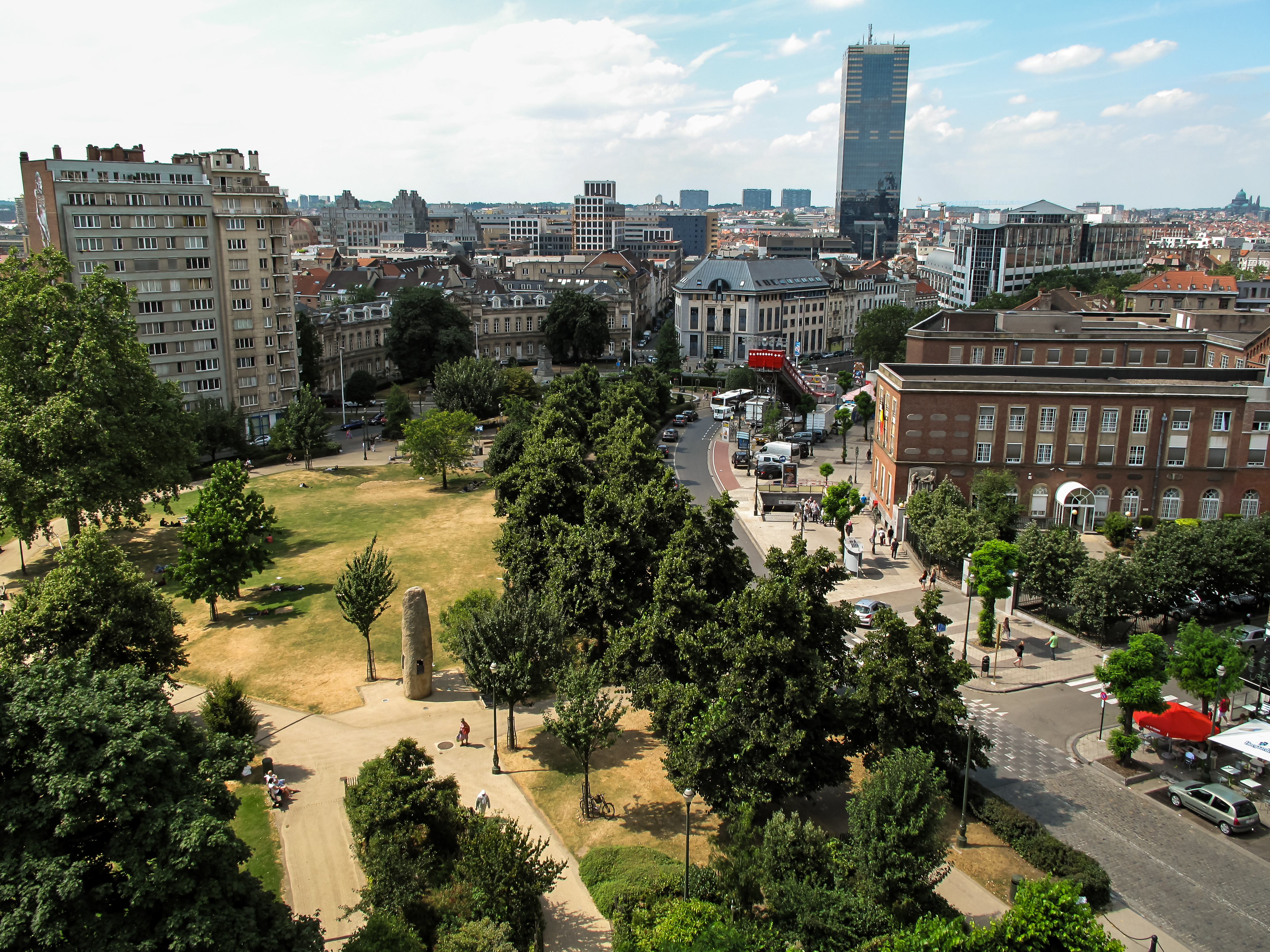 Hallepoortpark